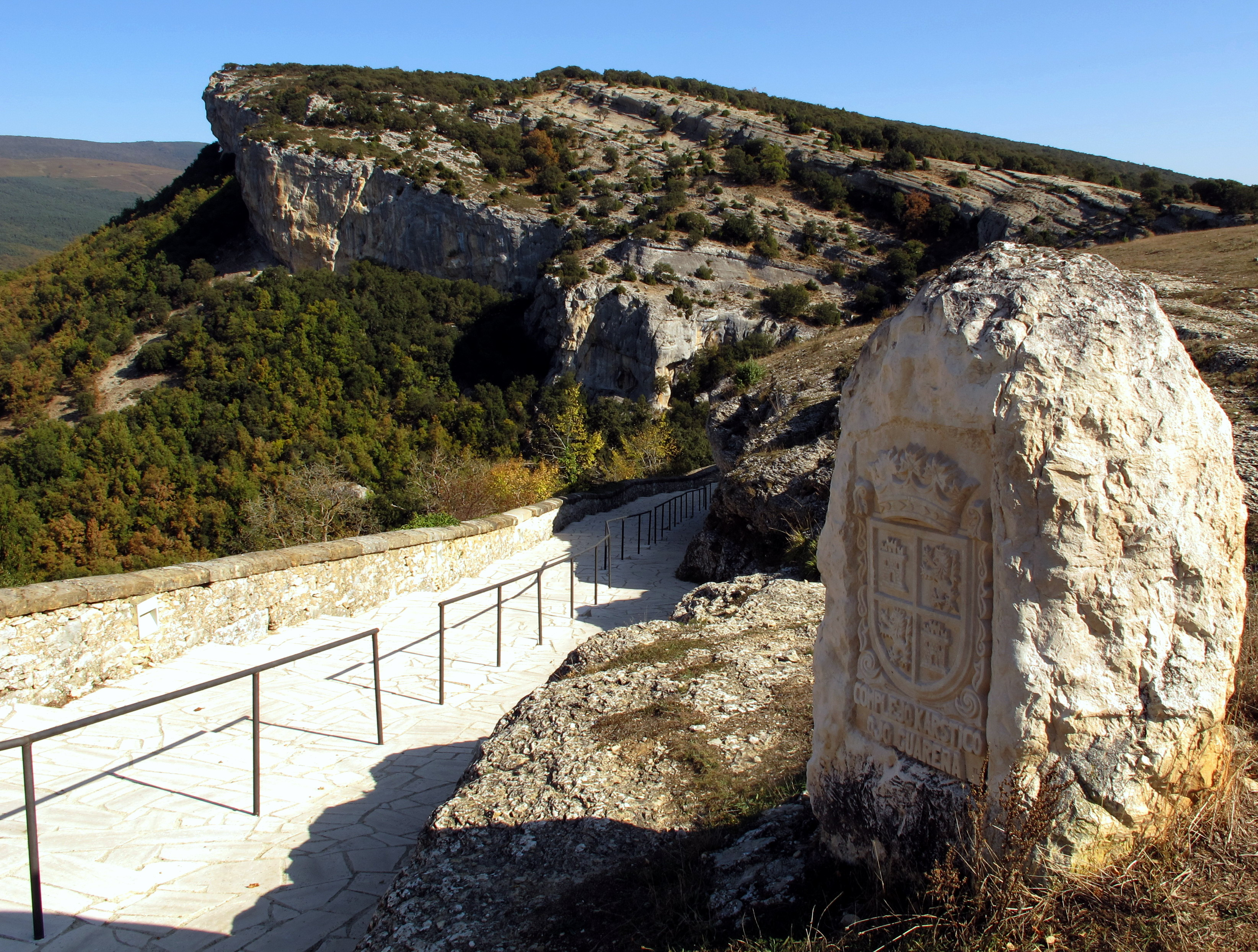 Con una extensión superficial de 13.141,84 hectáreas, se trata de un espacio destacable por su rareza y singularidad. Esta formado por 18 cuevas principales con más de 100 km. de desarrollo de los cuales 89 Km. se encuentran conectados, entre si, a través de distintas galerías y distintos niveles formando varios pisos que originan un gran laberinto de cuevas. El acceso al Complejo Kárstico esta prohibido dado su fragilidad y peligro, excepto la Cueva y Ermita de San Bernabé